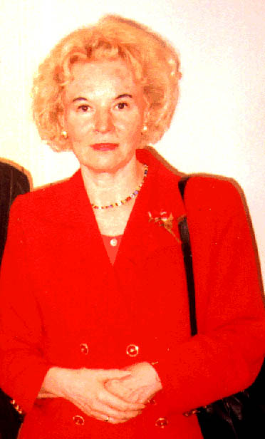 Katri Sarmavuori